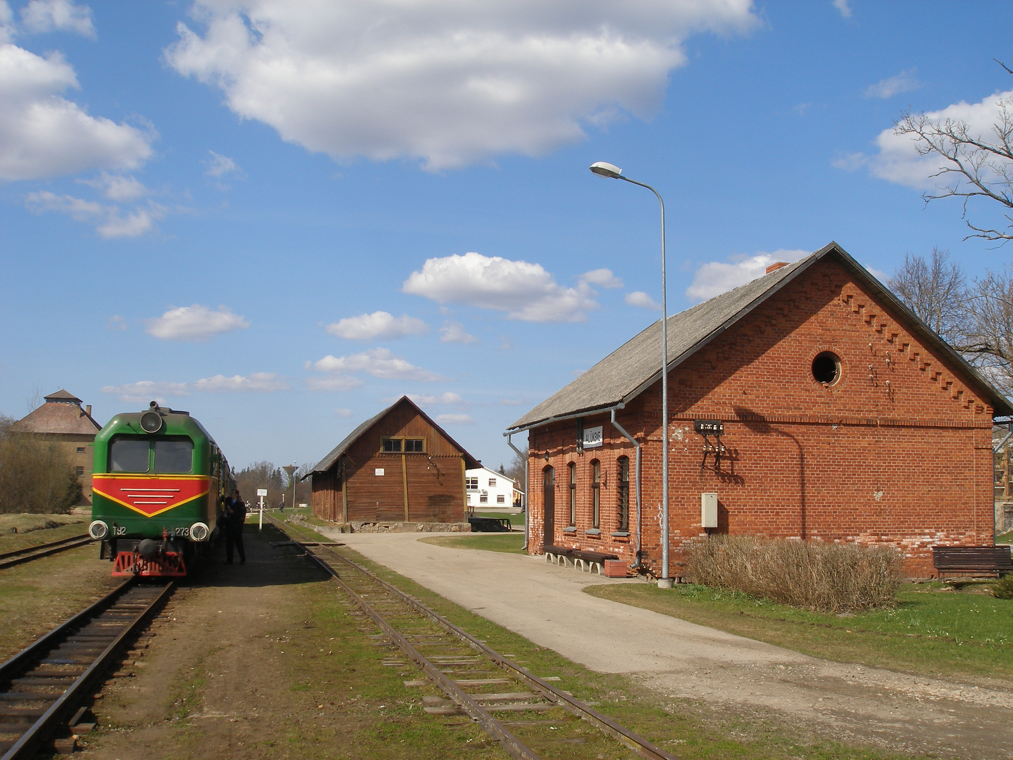 Alūksnes stacija